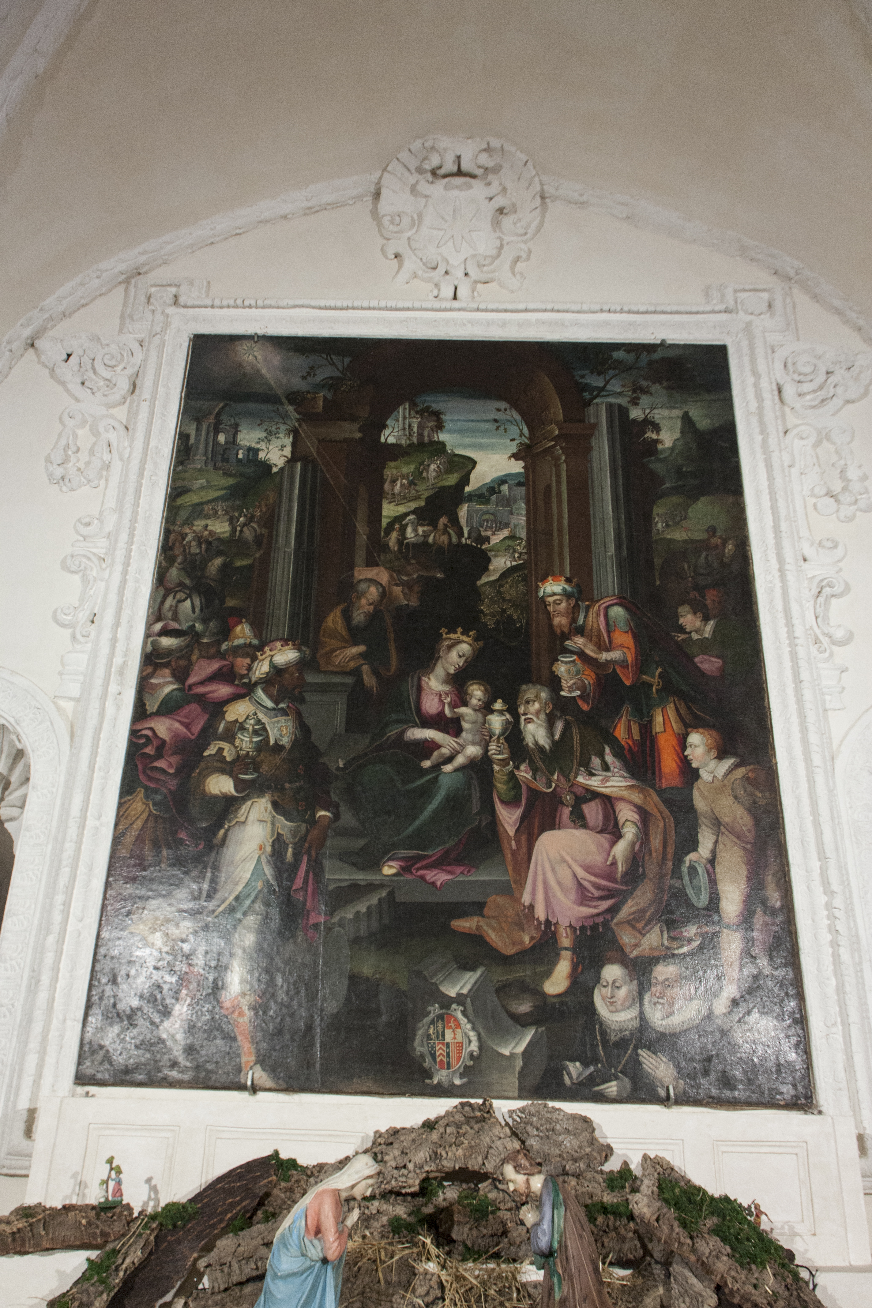 adorazione dei Magi - Orazio Ferraro 1602 cm 355x254 olio su tela presso Cappella dei tre re